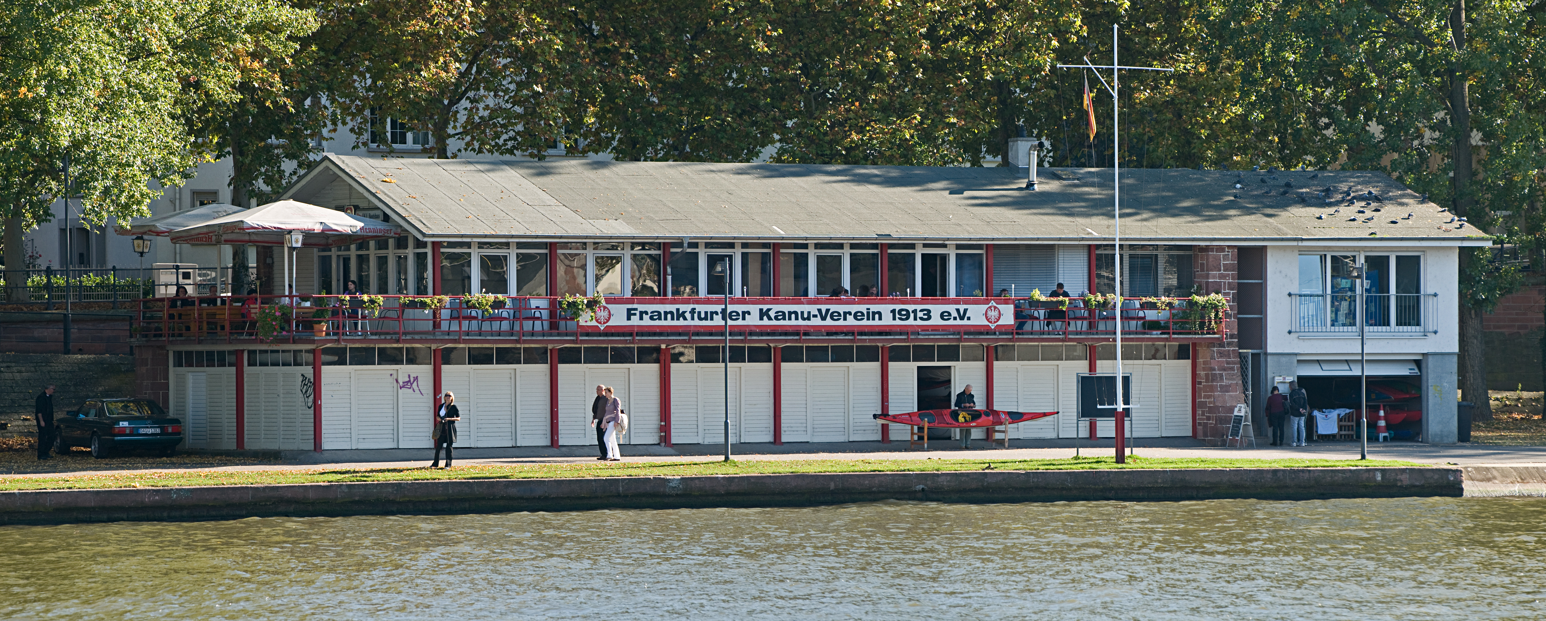 Vereinshaus des Frankfurter Kanuvereins 1913 e.V.